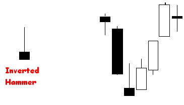 Analisi Tecnica, Candele giapponesi, Inverted Hammer.